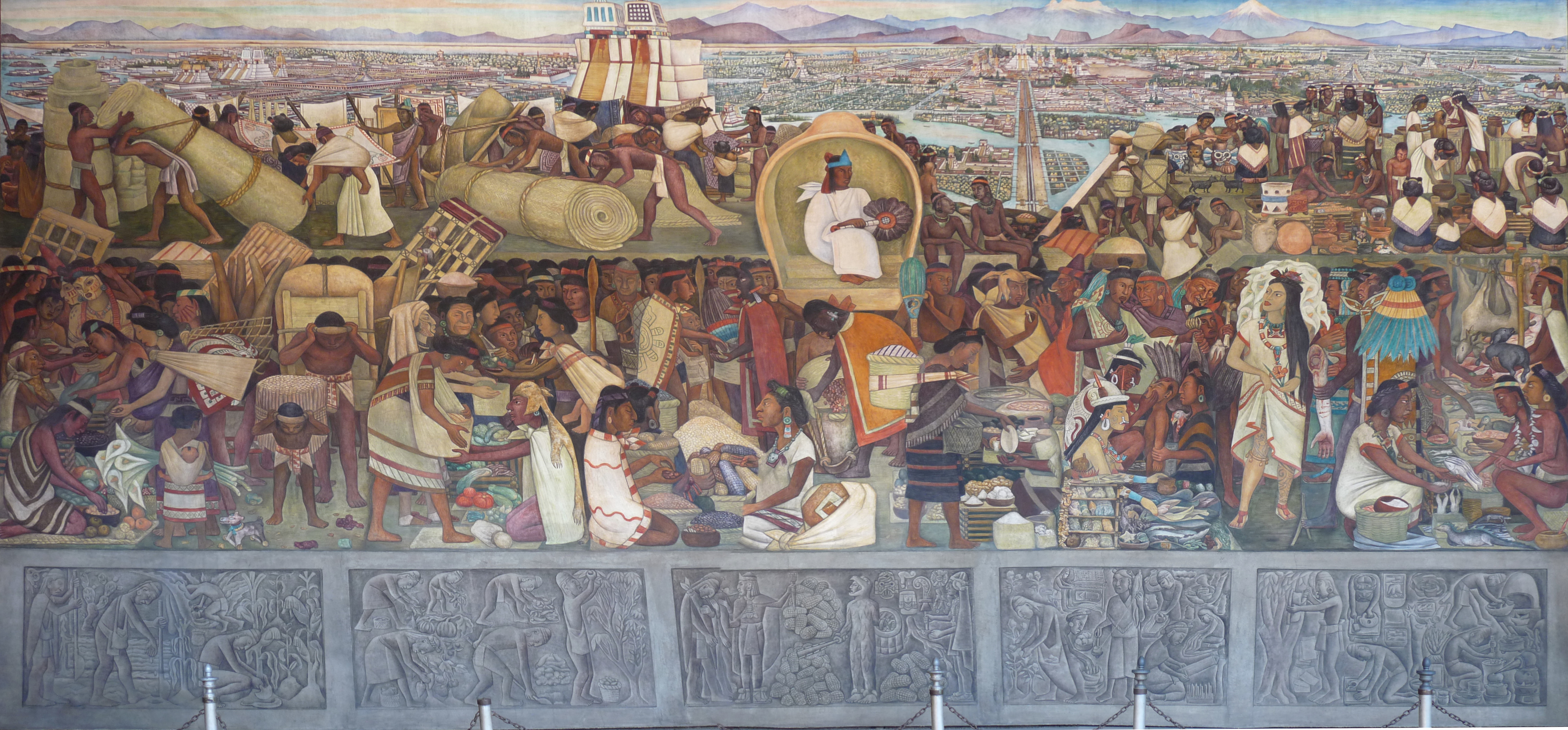 Mural pintado por Diego Rivera en 1945 en el Palacio Nacional de México